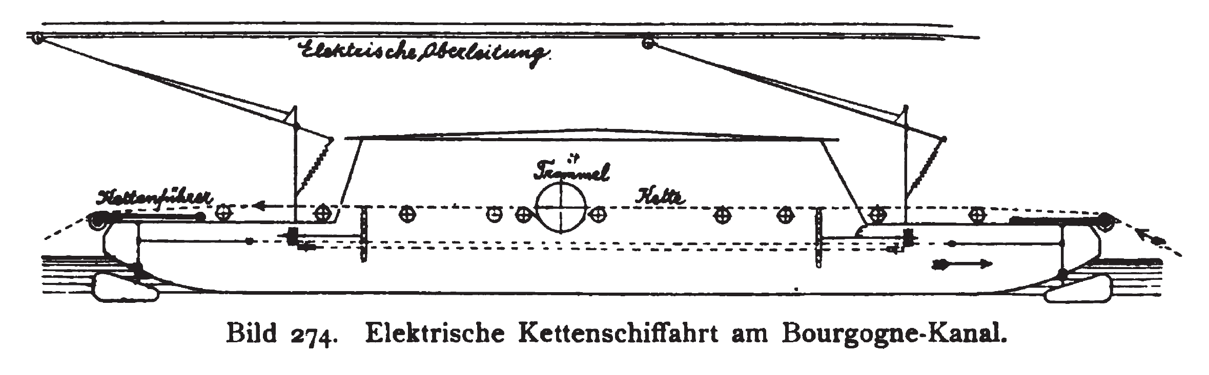 Darstellung der elektrischen Kettenschiffahrt am Bourgogne-Kanal